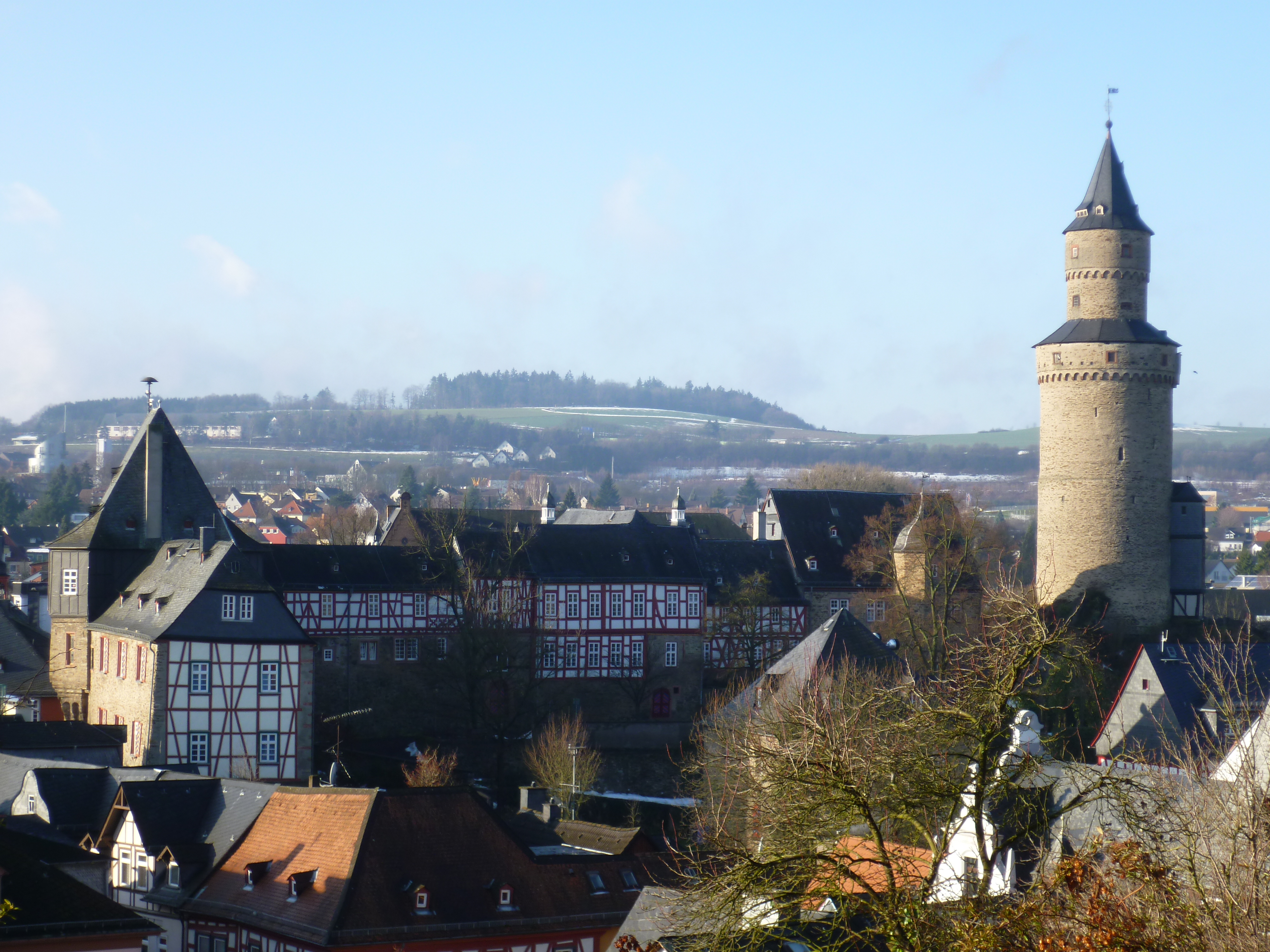 Die ehemalige Oberburg (Hauptburg oder Alte Burg) der Burg Idstein mit Hexenturm (Bergfried)